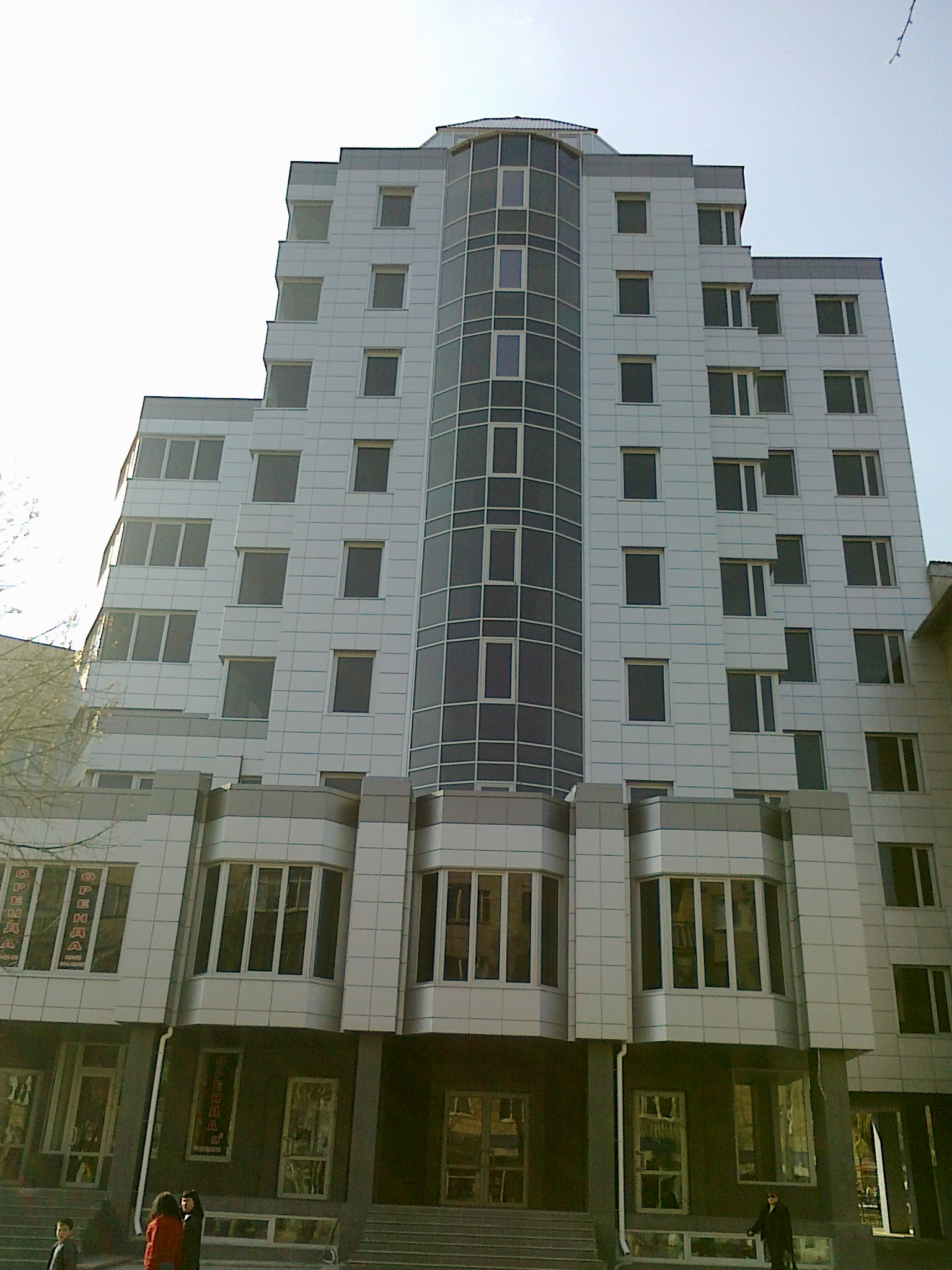 Вулиця Олеся Гончара (Біла Церква) 2